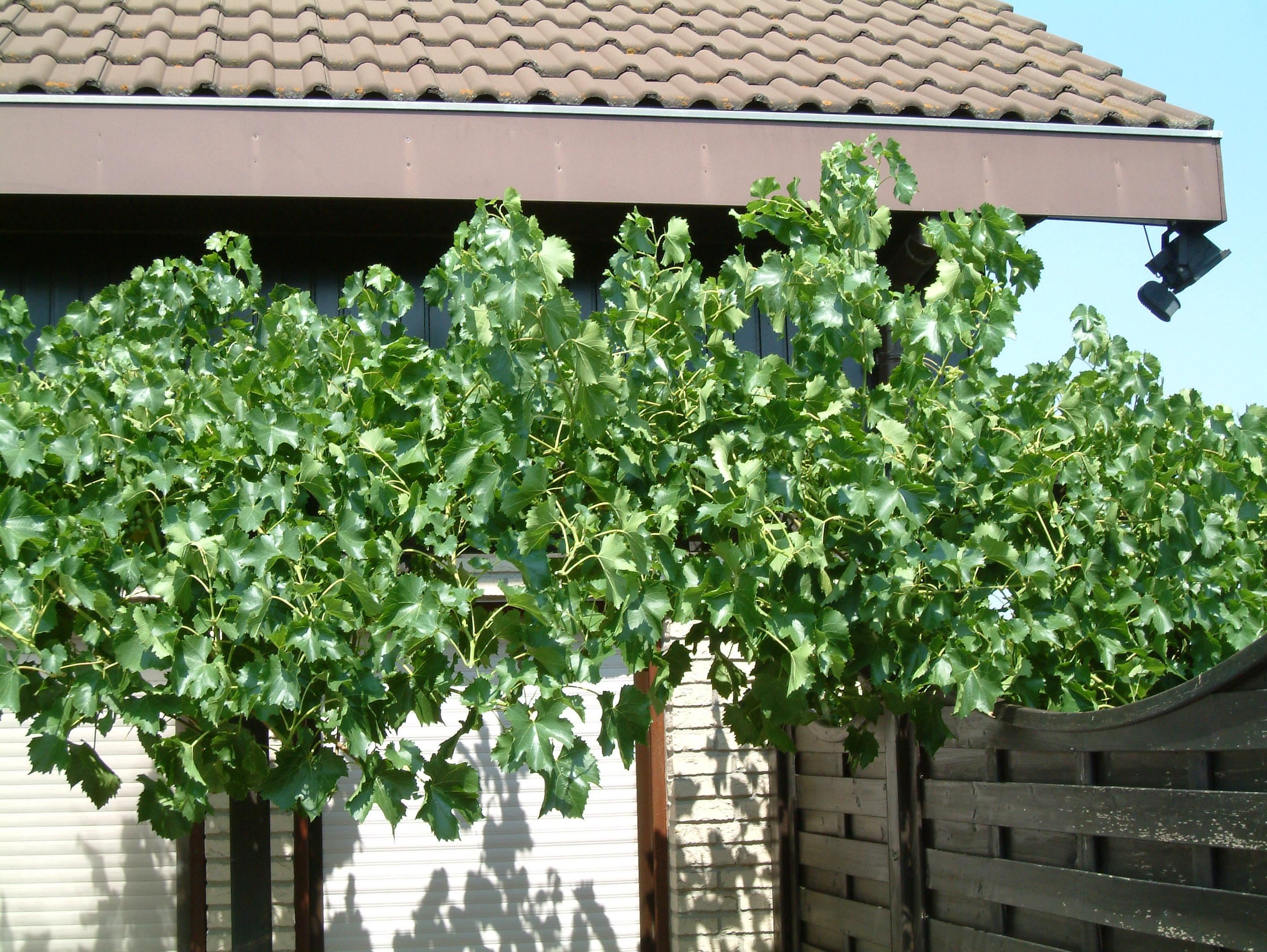 Hausrebe in Dirmstein, weiße Rebsorte „White Resistant“, selbst fotografiert am 23.07.2006 und freigegeben durch Benutzer:Mundartpoet